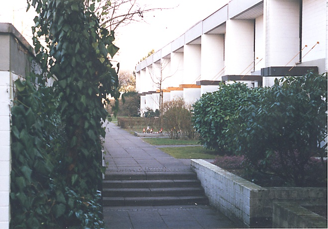 Baumgartensiedlung in Karlsruhe, Germany. Biult by Werkgemeinschaft Karlsruhe with Wolfgang Hirsch. Modern movement.